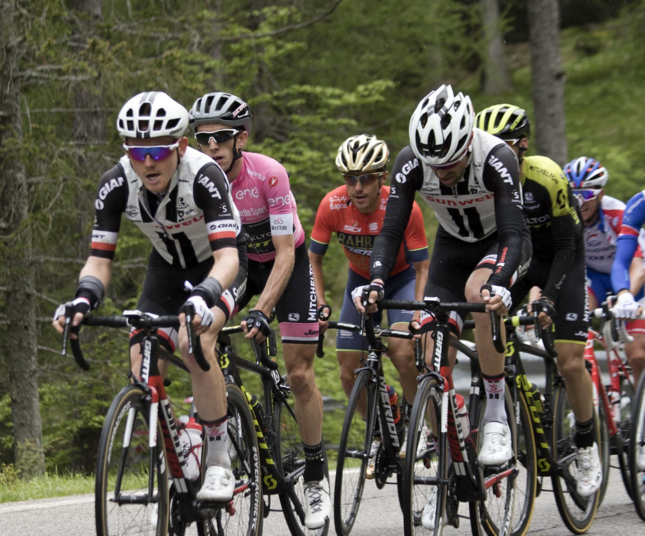 GIR20023 oomen yates dumoulin